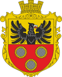 Герб с. Сулимівка (Яготинський район)